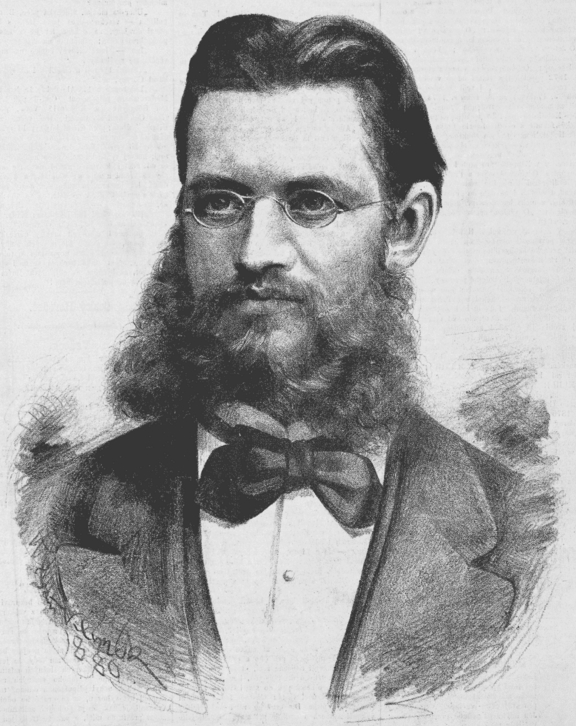 Jan Jaromír Hanel (1847-1910), český právník, rektor UK